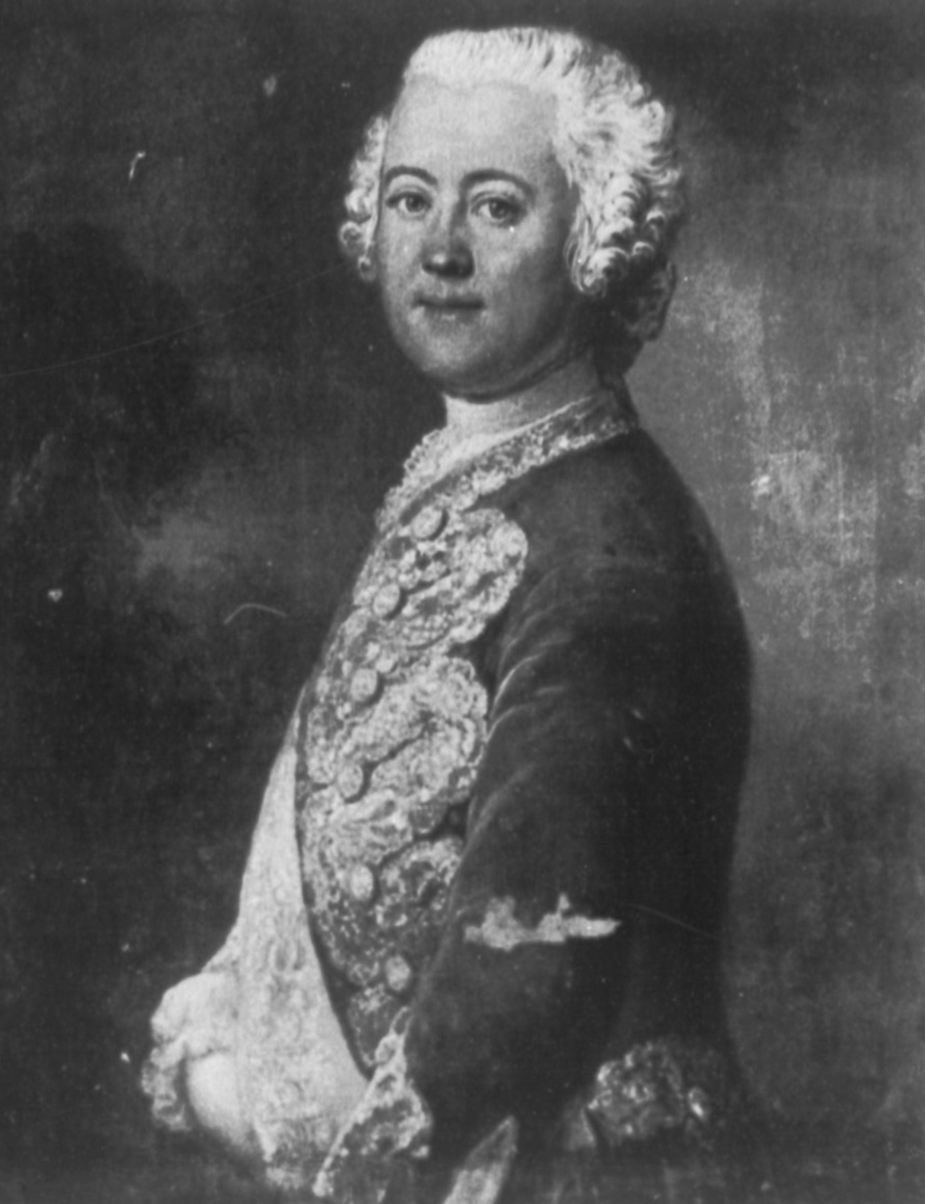 Michael Gabriel Fredersdorf (1708-1758), Geheimer Kämmerer und Vertrauter Friedrichs des Großen